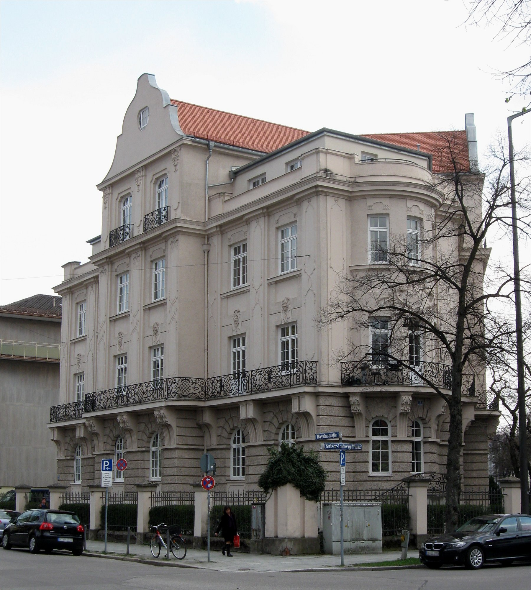 Kaiser-Ludwig-Platz 5; Mietshaus, neubarock, reich gegliedert, 1895 von Emanuel von Seidl